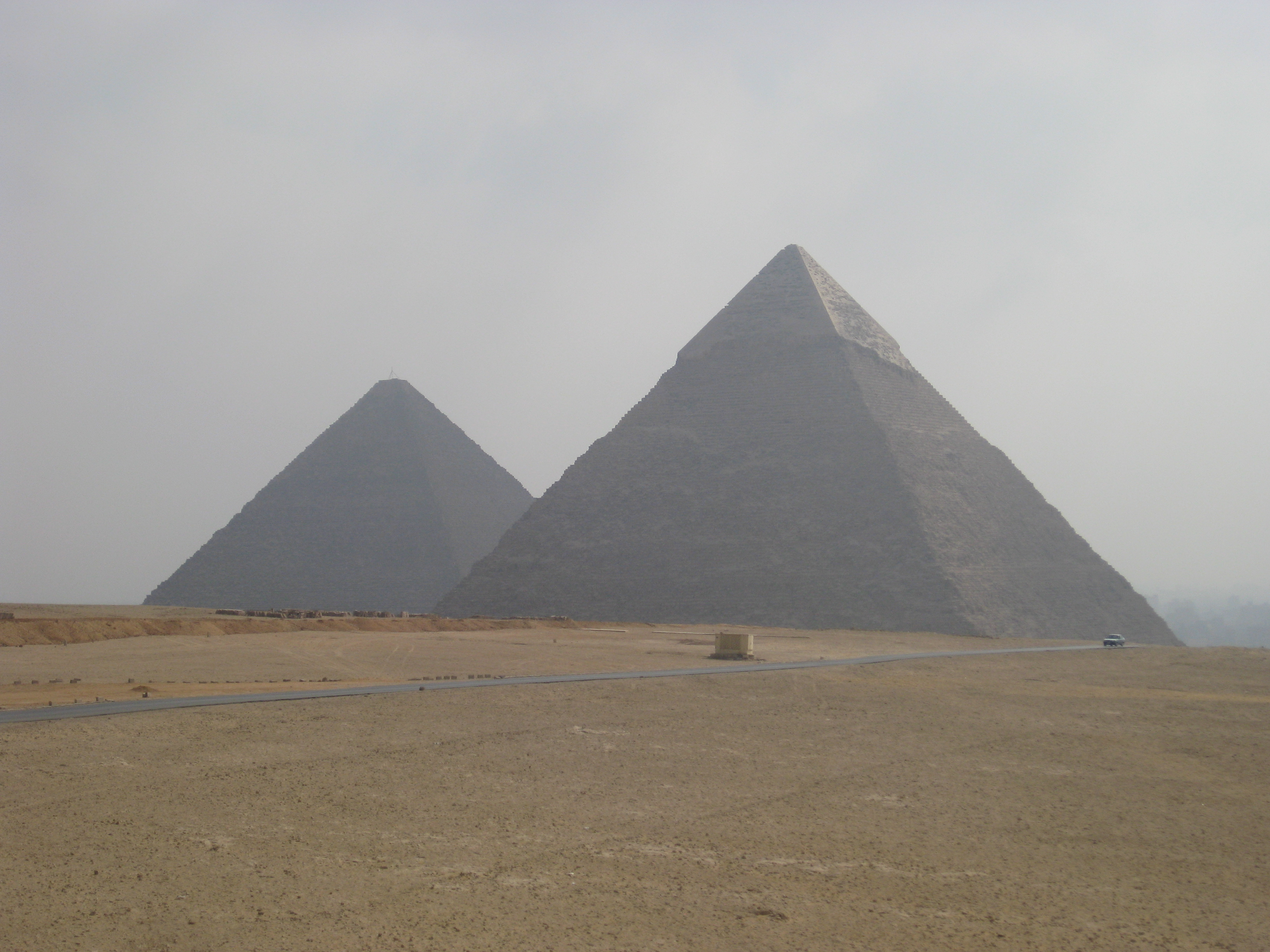 Piramides